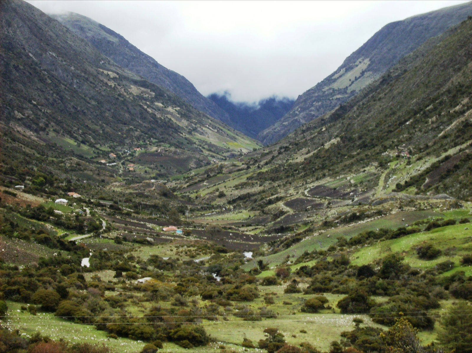 El Valle de Gavidia es uno de los espacios del páramo andino merideño menos explorado, desde donde fue tomada la fotografía inicia la cía hacia la laguna del Santo Cristo.